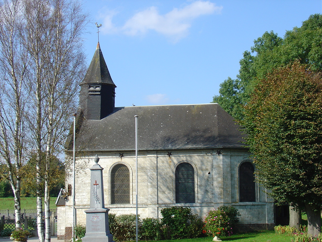 Église de Gouves